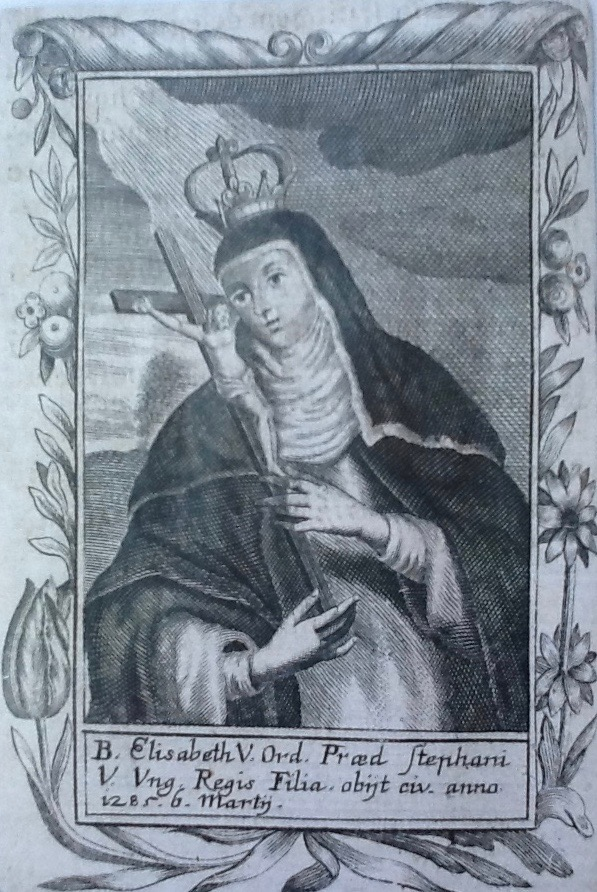 Tochter von König Stephan V. von Ungarn aus dem Hause der Arpaden und Elisabeth der Kumanin